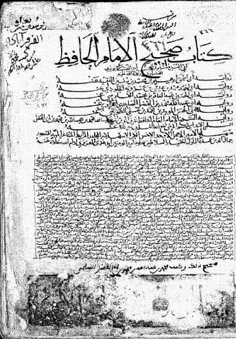 تصنيف:كتب الحديث تصنيف:كتب أهل السنة والجماعة تصنيف:أغلفة كتب